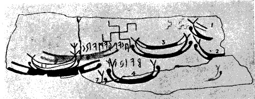 Kårstadsristningen (signum NKJ53) är en runhäll i Innviks socken, Stryns kommun i Norge, påträffad 1927. Kårstadsristningen består av ett hakkors, ett 10-tal delvis skadade skeppsbilder samt en inskrift med äldre runor.